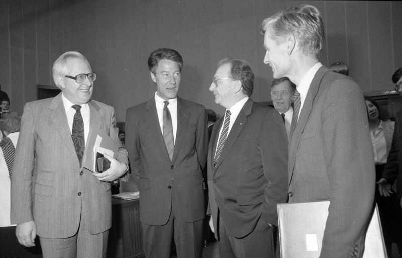 10.06.1988 Bundesratssitzung von links: Bundesratspräsident Dr. Bernhard Vogel, der neue Ministerpräsident des Landes Schleswig-Holstein, Björn Engholm, der Ministerpräsident des Landes Baden-Württemberg, Lothar Späth, und der neue Präsident des Senats und Erster Bürgermeister der Freien und Hansestadt Hamburg, Henning Voscherau